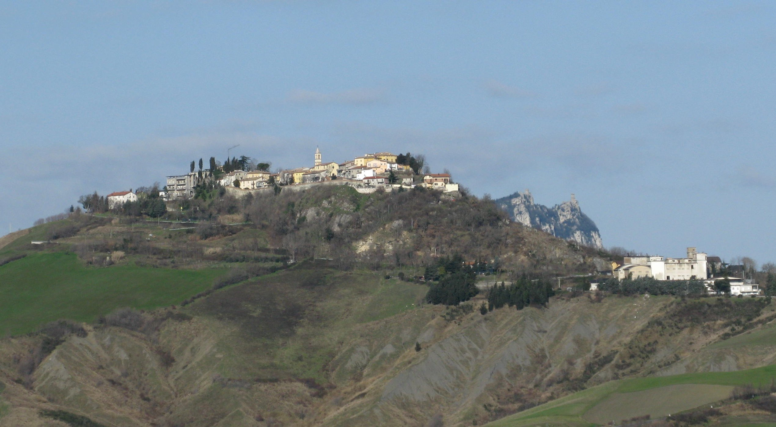 Panorama di Sassofeltrio.